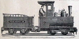 Decauville N°30 Février 1882, p. 64 Locomotive de 2,5 tonnes pur bruler le carbon. La ... locomotive du Porteur a ete Passe-Partout, locomotive de 2 tonnes et demie a voie de 0,50 qui a obtenu le premier prix (medallie d'or) de chemins de fer et locomotives agricoles a Lille en 1879. Locomotive de 3 tonnes pour bruler bois ou carbon. Un locomotive de nuveau type, mais de 3 tonnes, a ete vendue a MM. M. Gargam et Cie, fabricants de sucre a Saint-Quentin, qui l emploient pour le transport de betteraves avec 3 kilometres de voie de 0,50 en rails de 7 kilos. Locomotive de 2,5 tonnes avec disposition speciale pur le service des galeries de mines, hauteur totale aud dessus du rail, 1 m 75. Les ateliers de Petit-Bourg presedent egalement un type special pour le services des galeries des mines. Locomotive 2,5 tonnes a cabine pour abriter le chauffeur, avec tender peur porter l'eau et le combustible, type adopte par le Gouvernmen russe pour la guerre du Turkistan. Deux locomotives de 7,5 tonnes, se chauffeur au petrole, ent ece liveres auf Gouvernment russe pour la guerre du Turkestan. Un autre type est 'Panama'. locomotive a voie de 0,60 de 4 tonnes a vide, et 5 tonnnes en ordre de marche pouvant, grice aux provisions d'eau et de combustible portees par son tender, mener un train de 15 tonnnes a quarante kilometres en meins de 2 heures, sans arreter. Cette locomotive destinee a la voie en rails de 9,5 kilos sert accuellemen a Petit-Bourg des expericences avec un train complet de voitures de 1ere, 2e et 3e classe et a bagages (modele du Festinog). Un train complet de ce materiel avec locomotive de 4 tonnes a ete livre au marquis de Campo, pour le service de son chateau de Vinelas, en Espagne.